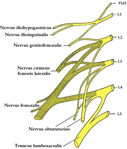 Vagusgruppe, Image:Gray822.png, nachbearbeitet und Beschriftung modifiziert (Deutsch/german) von Benutzer:Uwe Gille